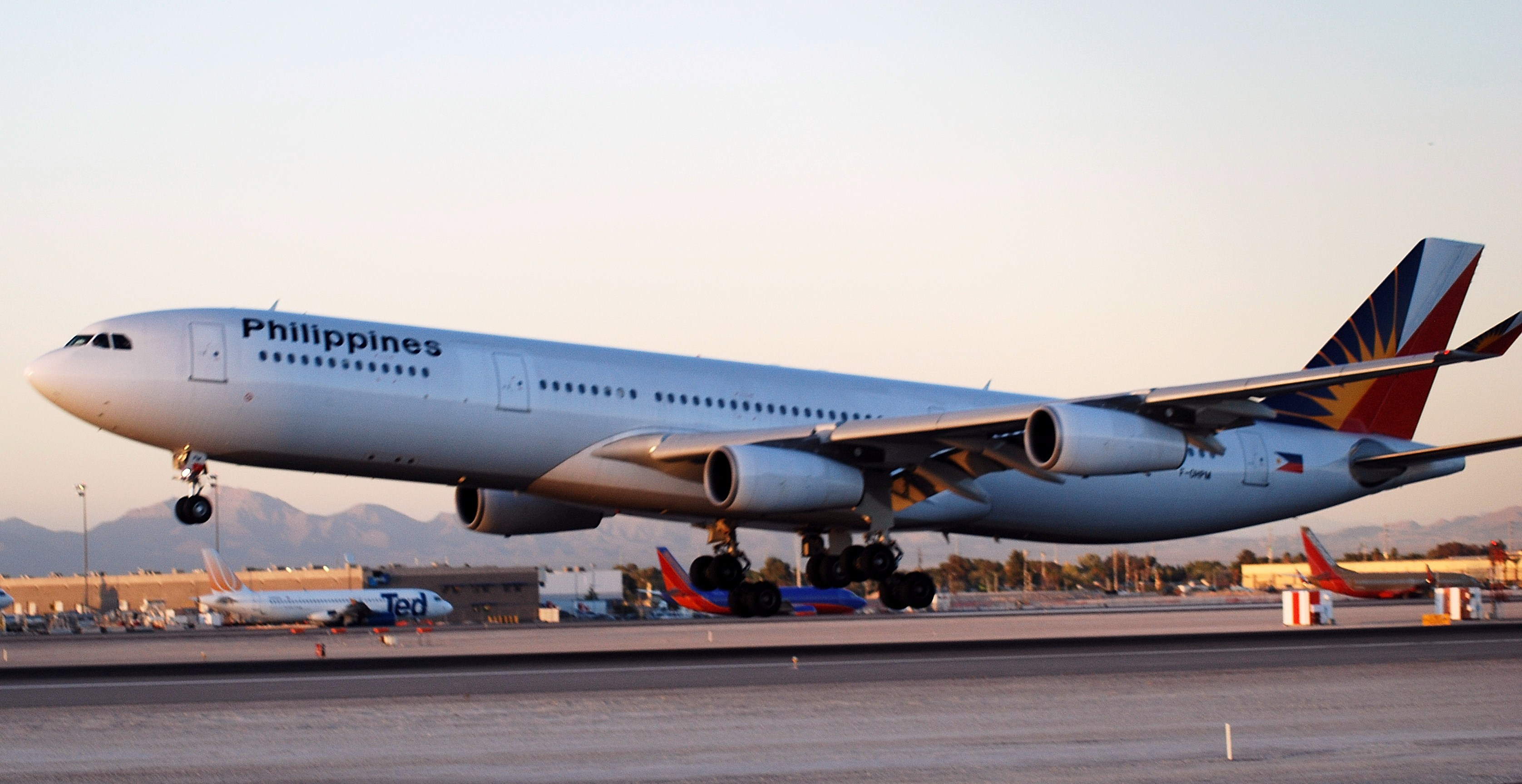 Philippenes